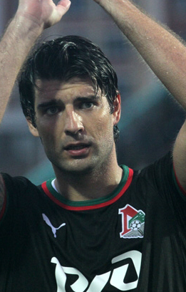 Ведран Чорлука